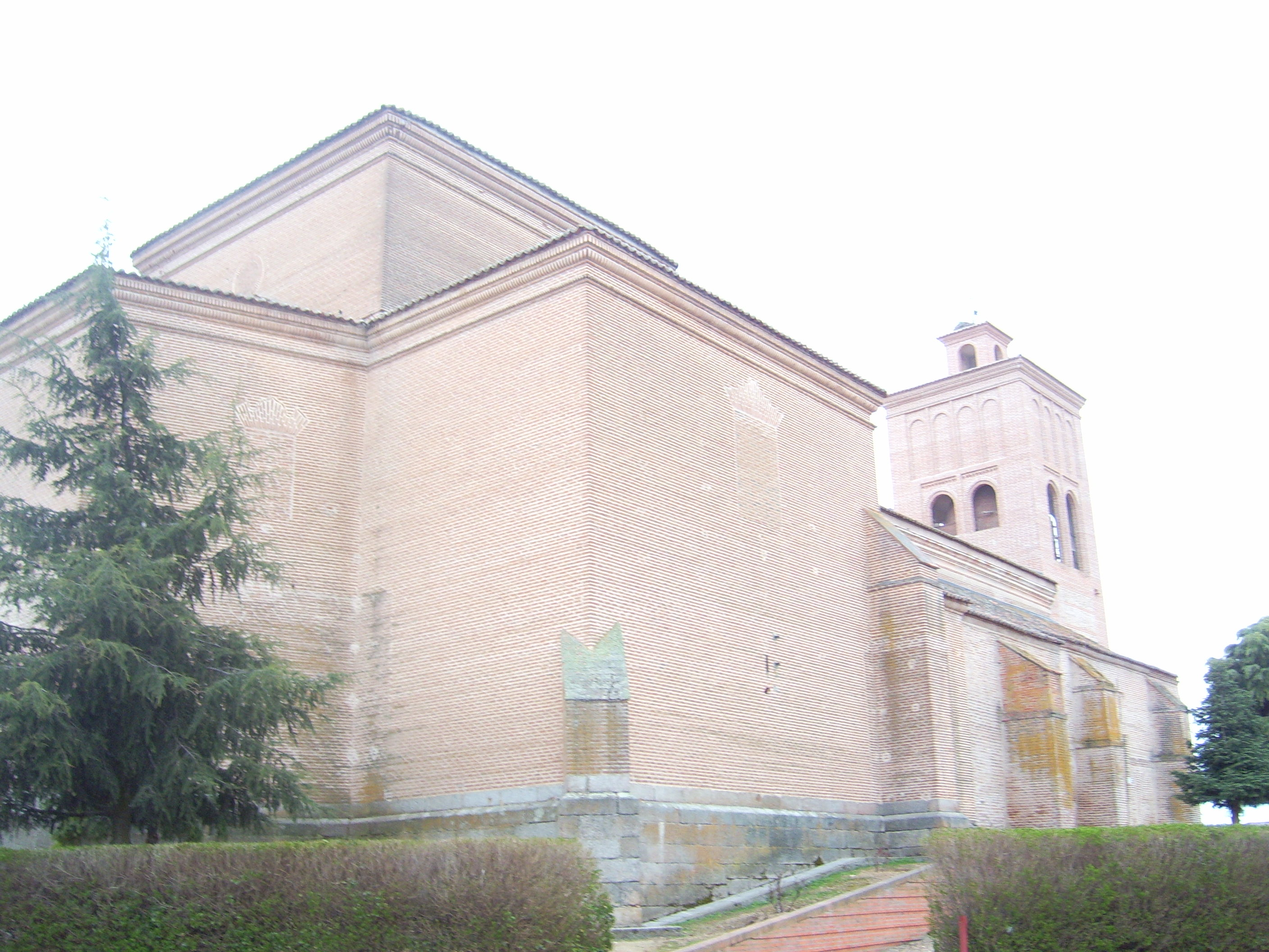 Iglesia de Horcajo de las Torres (Ávila, España)